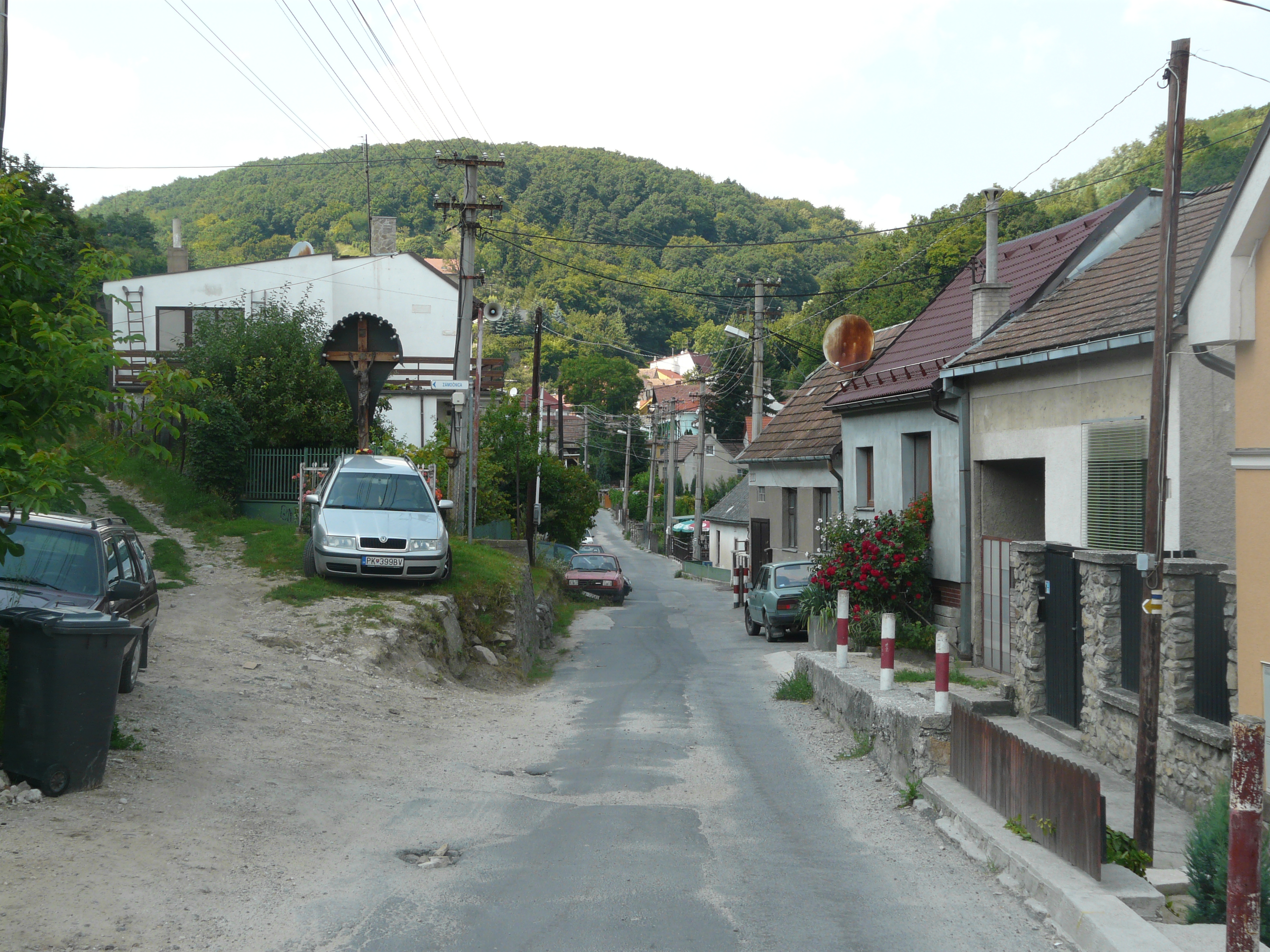 Pohlad na obec Nestich.